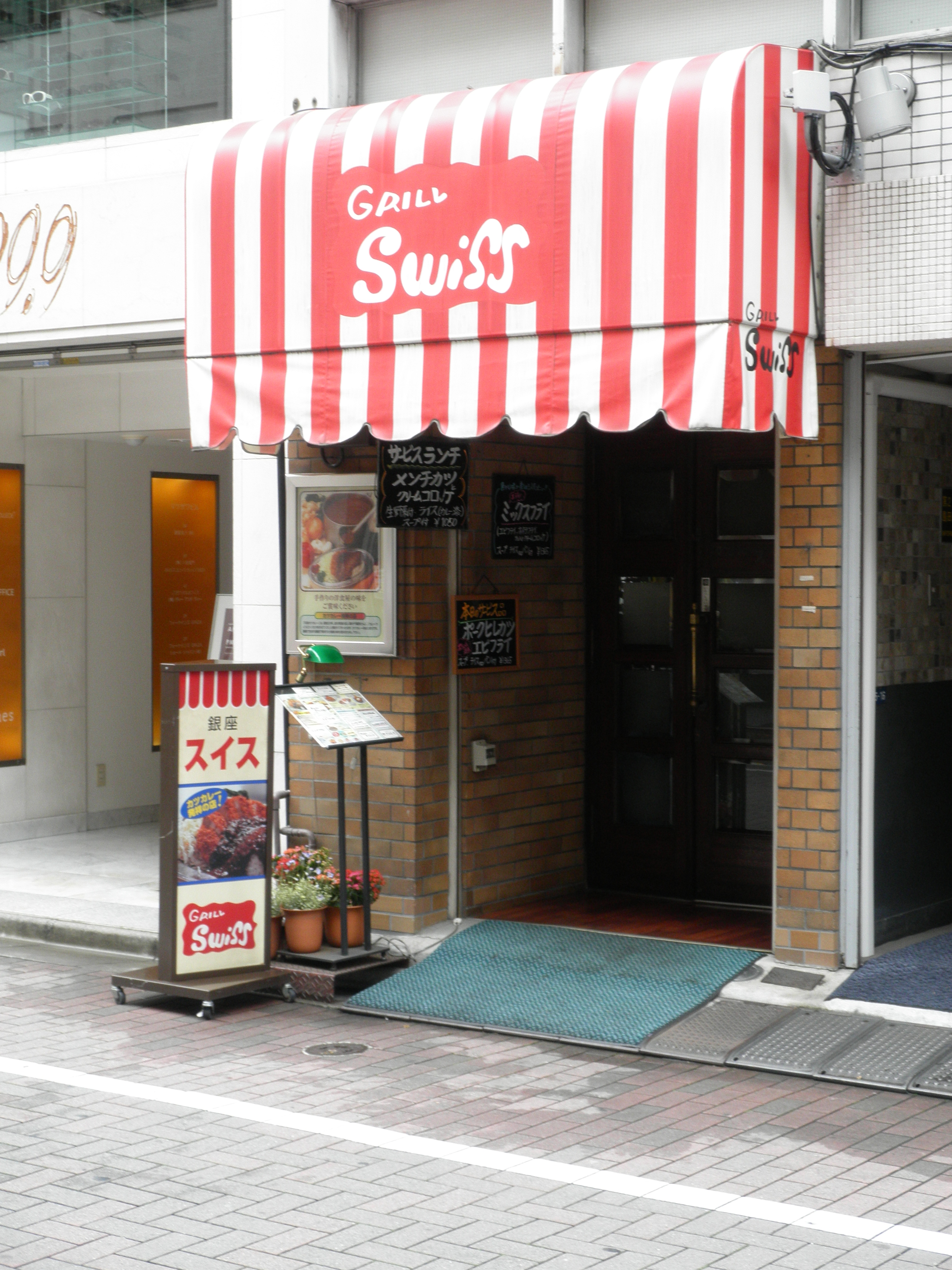 グリルスイス本店